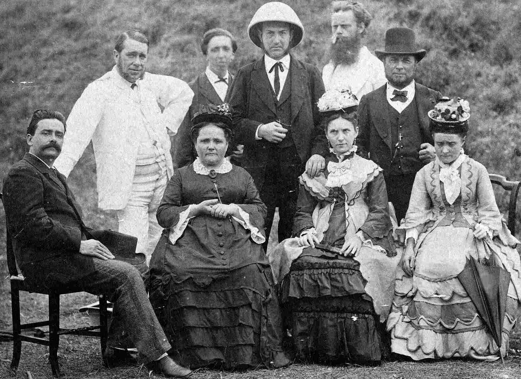 Photographie prise pendant le voyage fait par Jean Abraham Chrétien Oudemans à La Réunion pour observer le transit de Vénus.